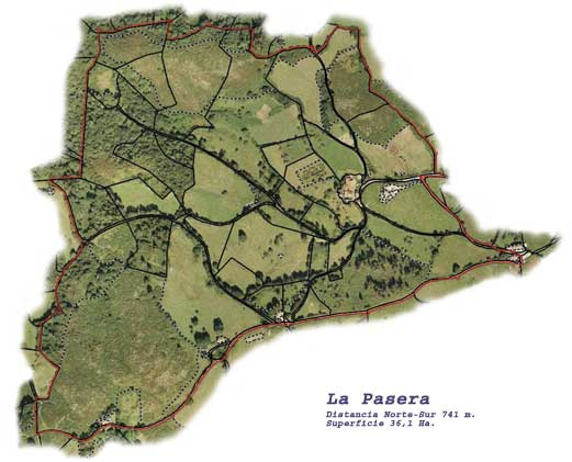 Fotografía satélite de Noreña